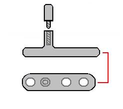 Dette er et smykke der bruges til en form for piercing.